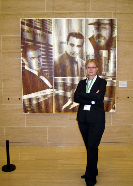 Kuenstlerin Eva Paar in Peking